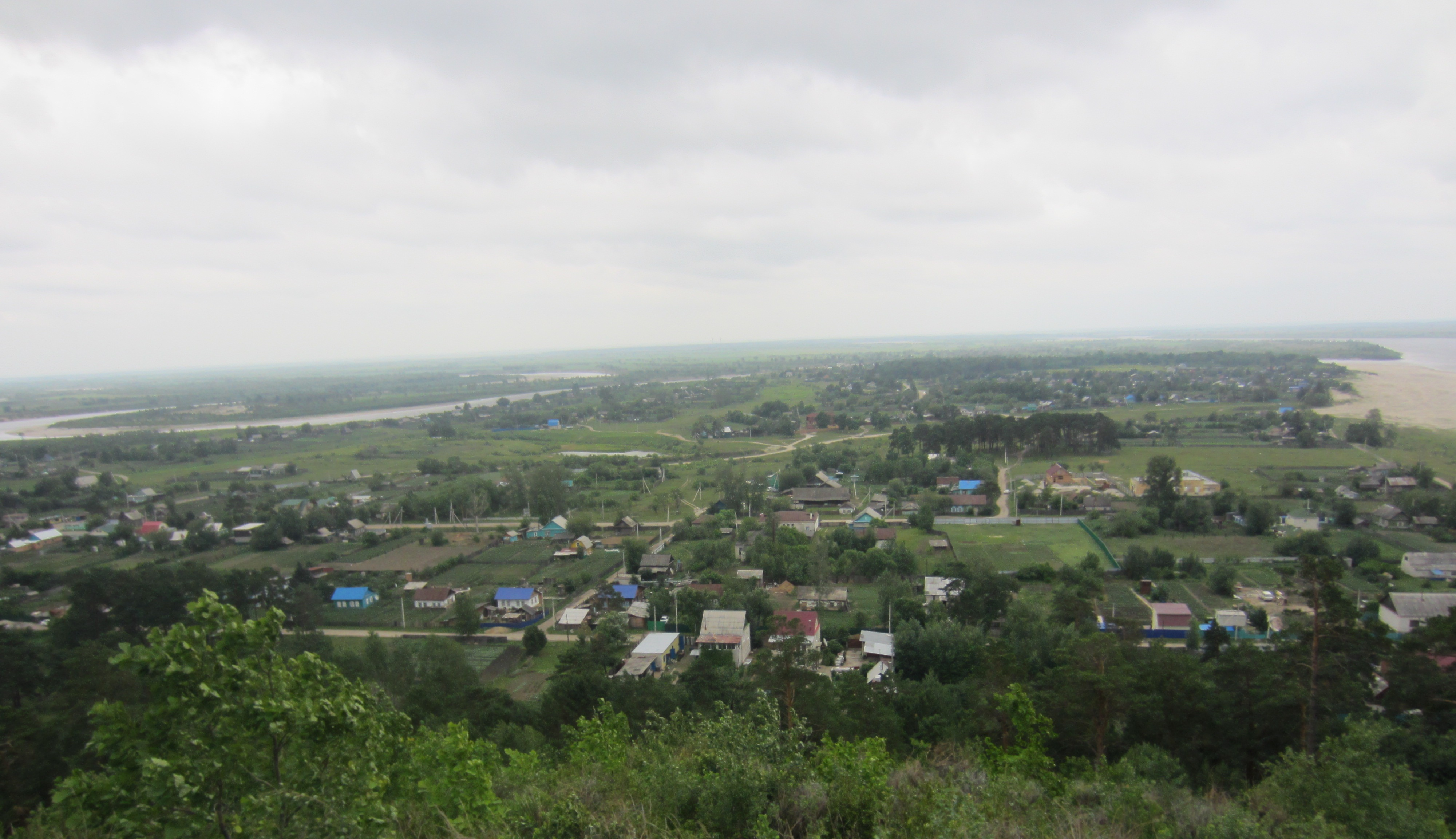 Малая Сазанка